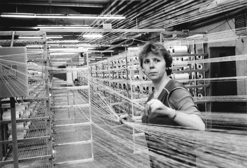 ADN-ZB-Bartocha 15.6.1989 mx-Bez. Schwerin: Als erster Betrieb der Textilindustrie der DDR erhielt das Teppichwerk Nord Malchow, Kreis Waren, das Ehrendiplom "15 Jahre Betrieb der ausgezeichneten Qualitätsarbeit". Aus dem Werk kommen in diesem Jahr rund 4,5 Millionen Quadratmeter Florteppiche in drei- und fünffarbigen Mustern sowie Boucleware. In der Bäumerei arbeitet Karin Hipke.